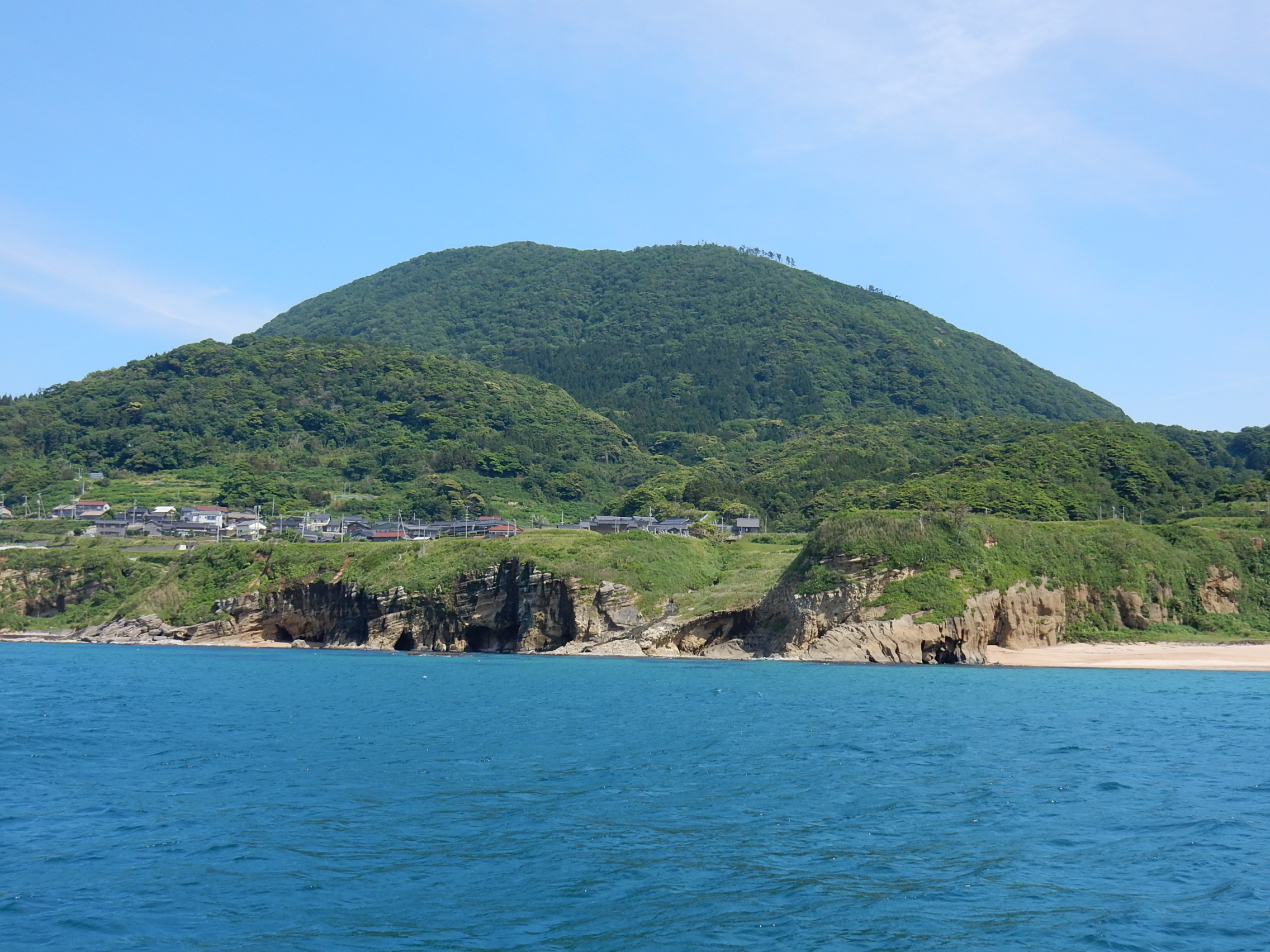 日本海より見る依遅ヶ尾山（京都府京丹後市丹後町）